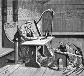 engraving from Fredrik Sander's 1893 edition of the Poetic Edda. Apparently(?) reprinted in Det korta kvädet om Sigurd i Eddan , De nordiska guda- och hjältesångerna by Erik Brate (1913).